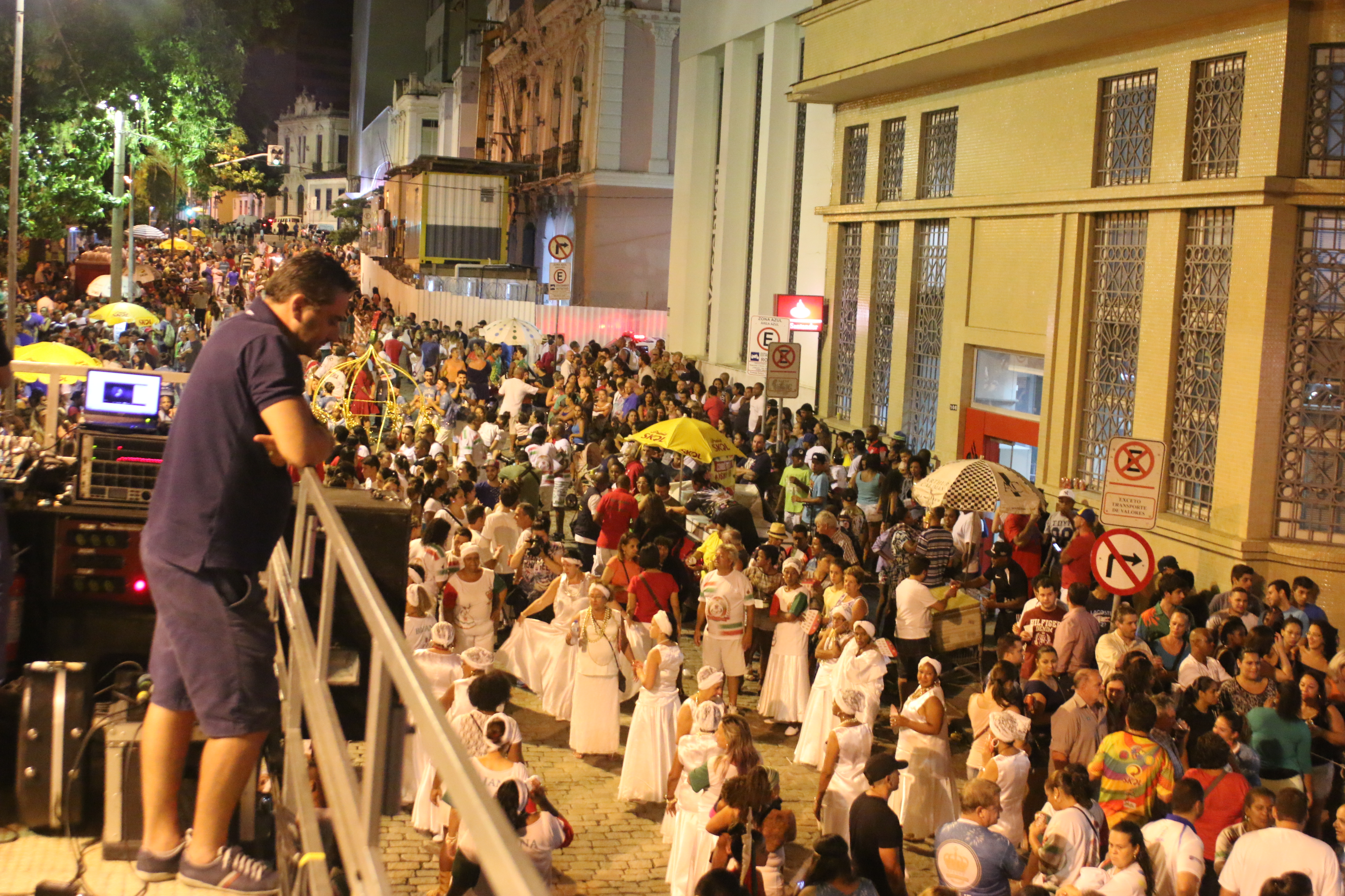 G.C.E.R.E.S. Protegidos da Princesa fazendo o ensaio "Volta a Praça XV" em 2015.